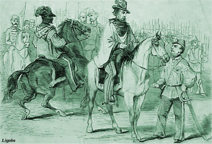 Giuseppe Garibaldi con Nino Bixio e Andrea Aguyar, detto il "Negro di Garibaldi", a Roma nel 1849, durante la difesa delle Repubblica Romana.